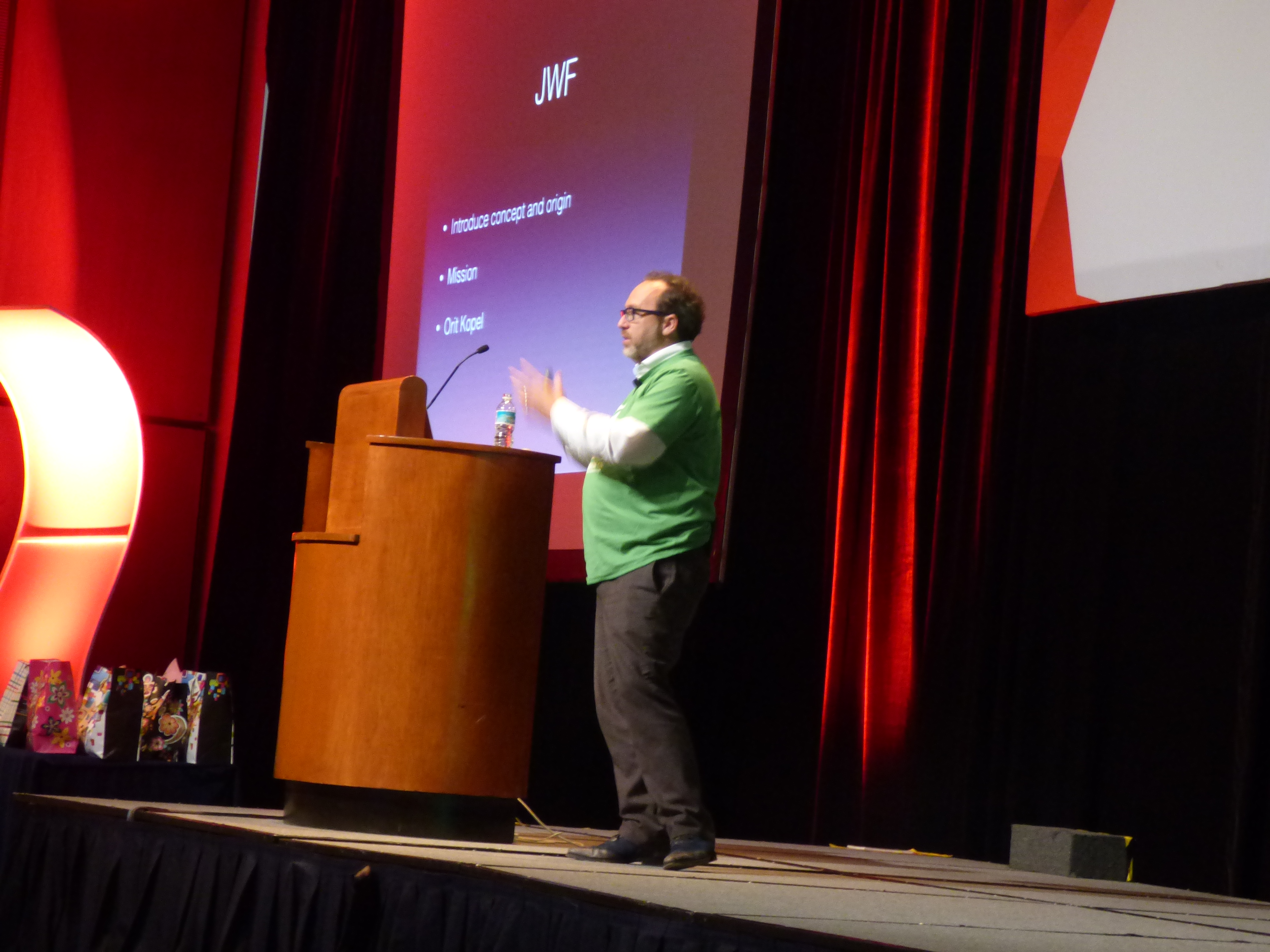 Ceremonia de clausura y el estado de la Wiki en Wikimania